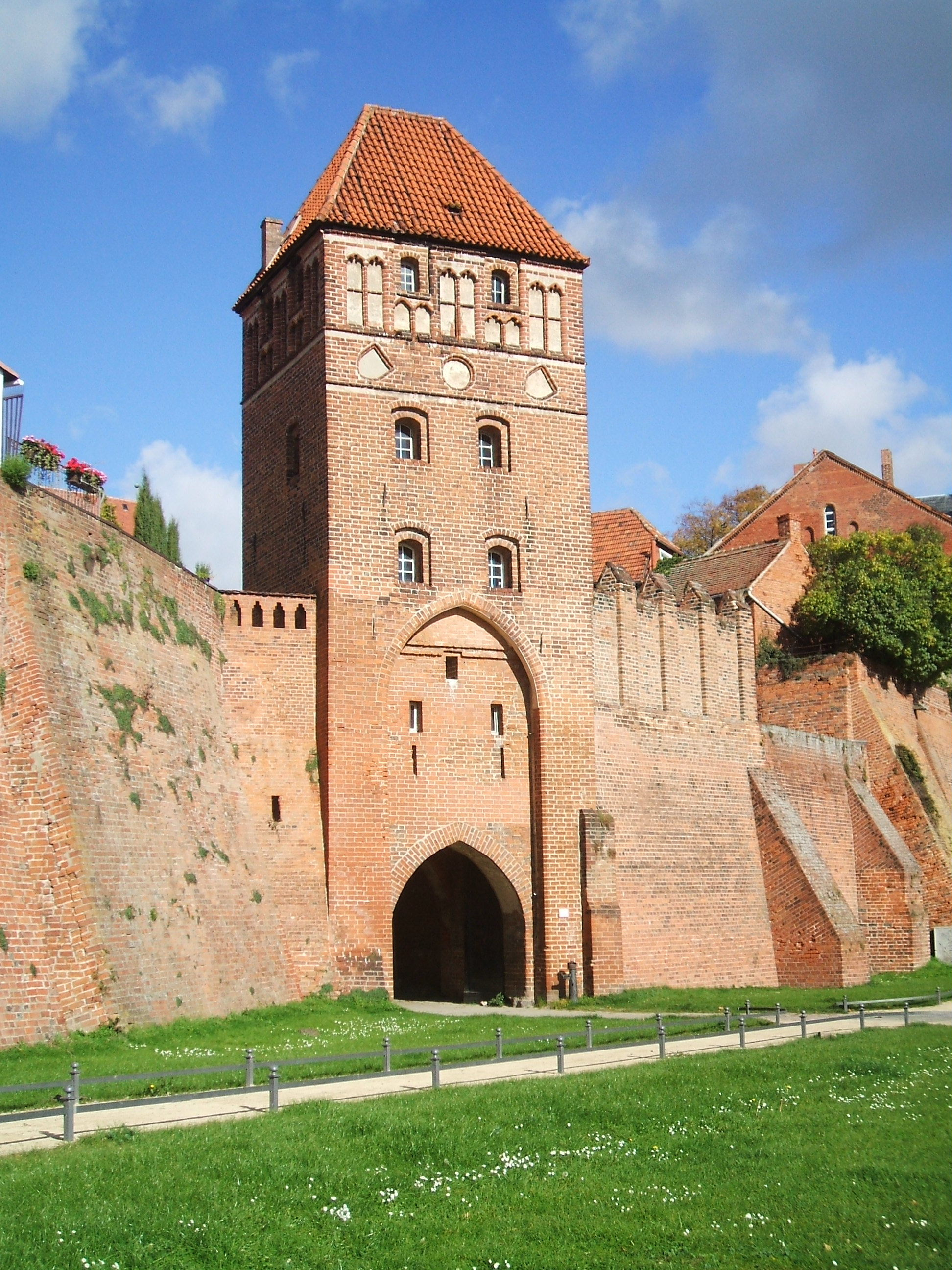 Tangermünde,_Stadttor